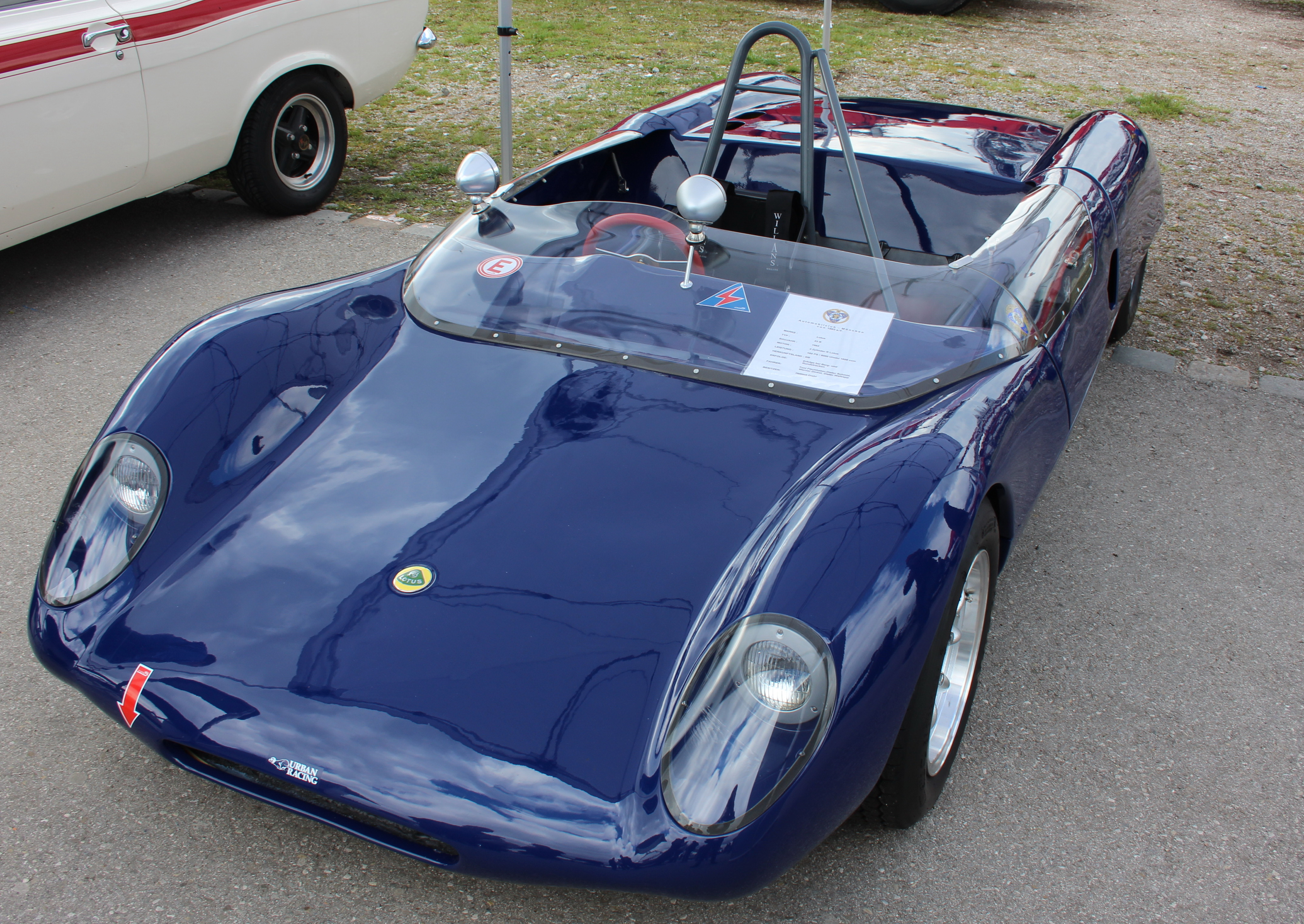 Lotus 23B auf der Theresienwiese